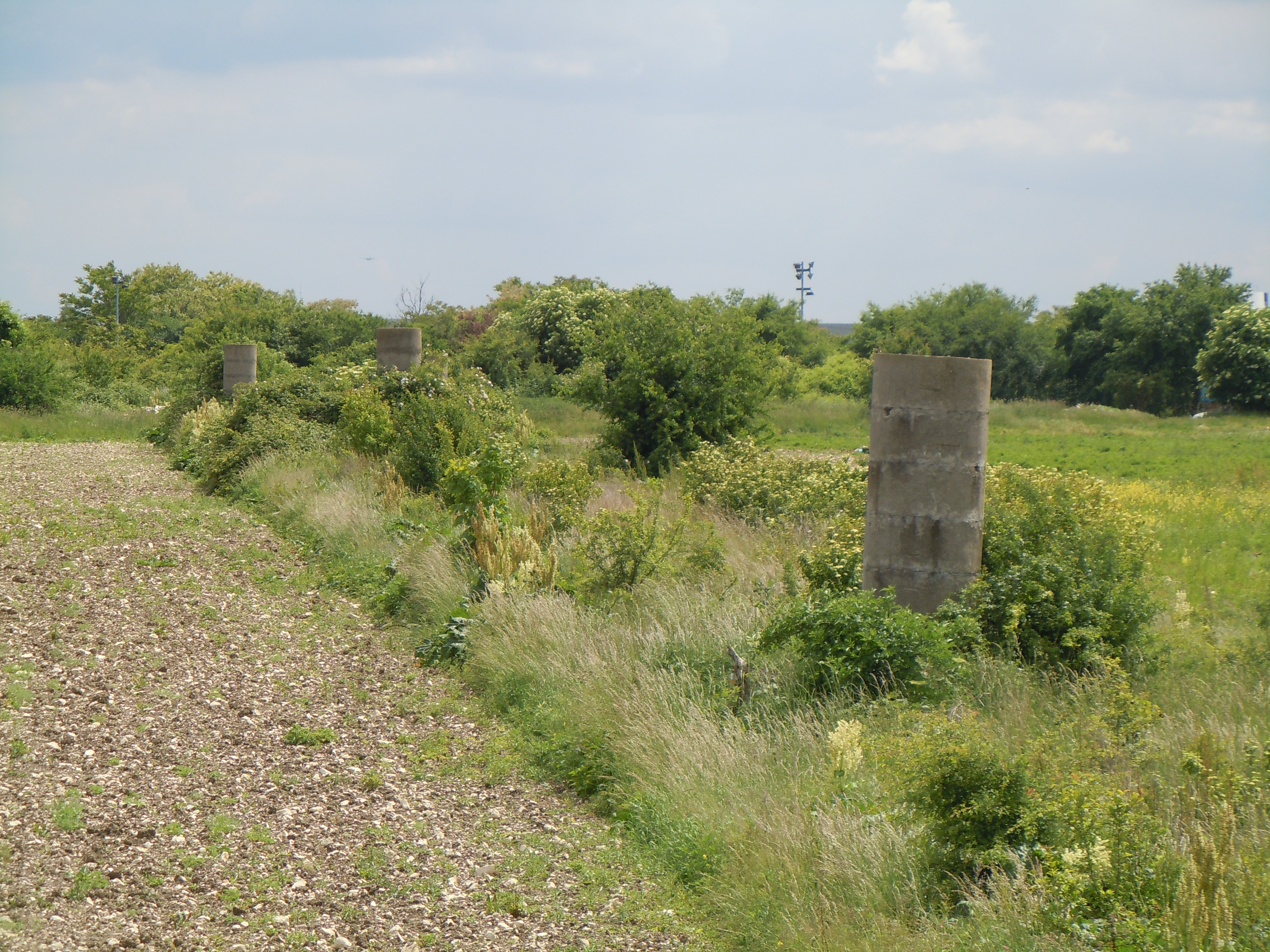 Rangée de cheminées d'aréation d'une champignonnière dans la plaine de Montesson